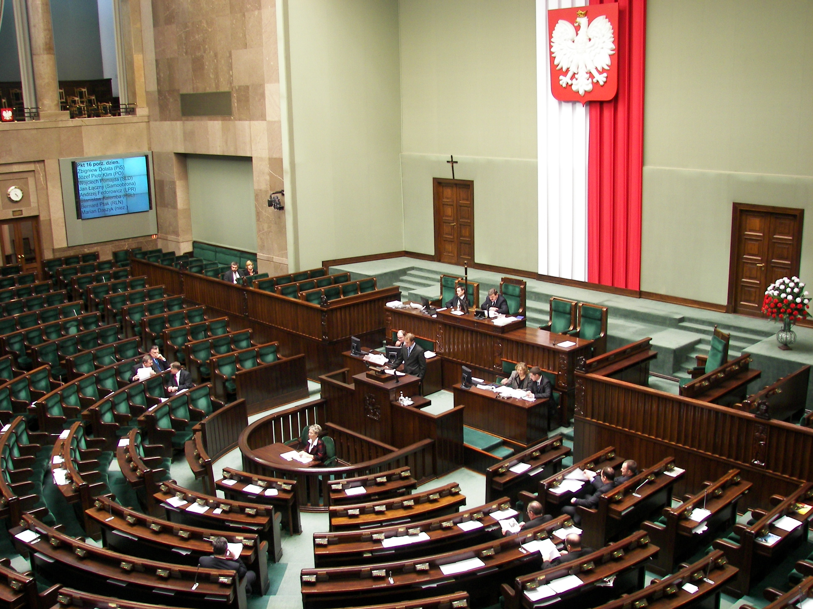 Sejm RP, Sala Plenarna